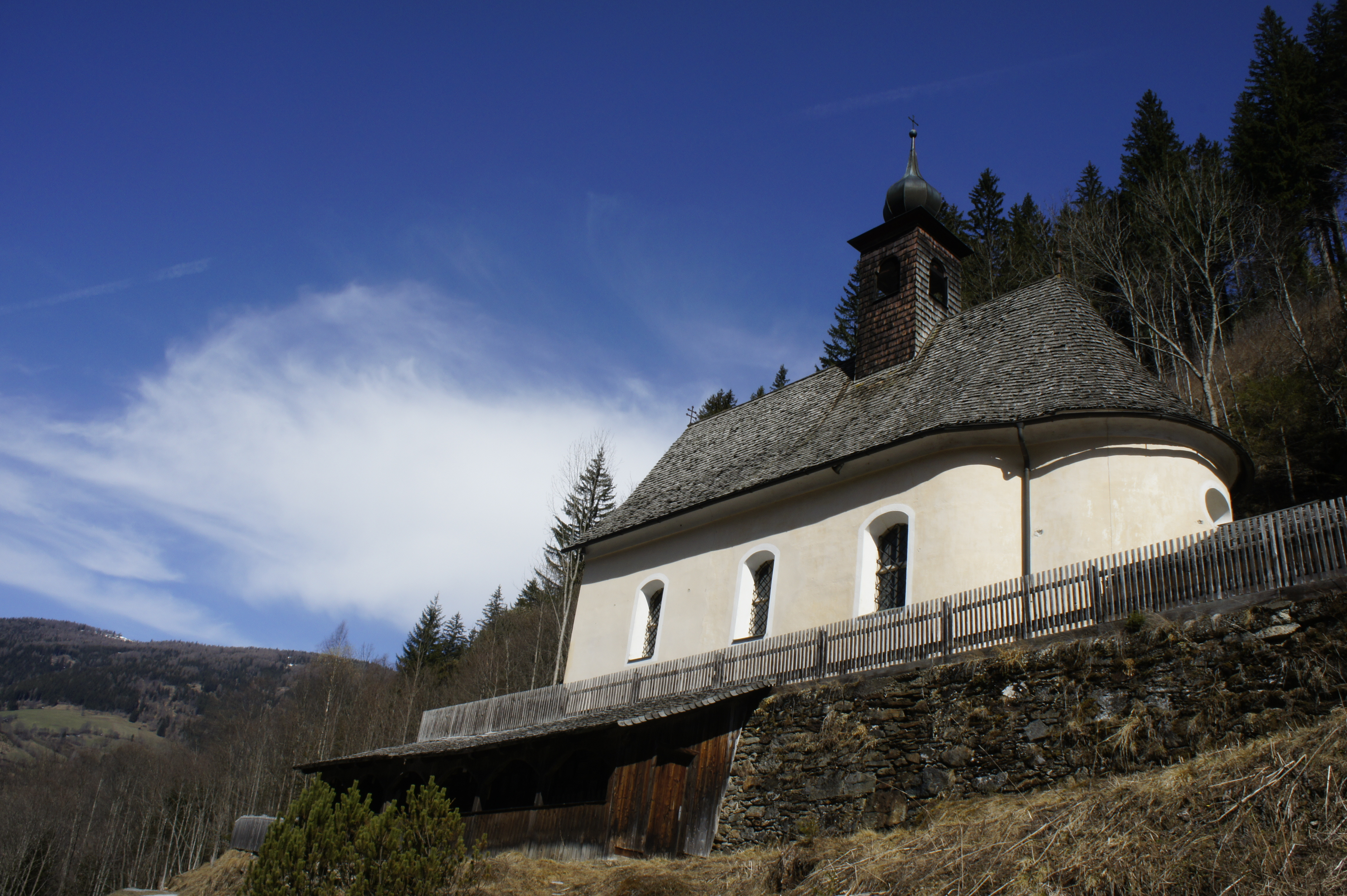 Kath. Filialkirche Maria Hollenstein, Unsere Liebe Frau Maria Heimsuchung